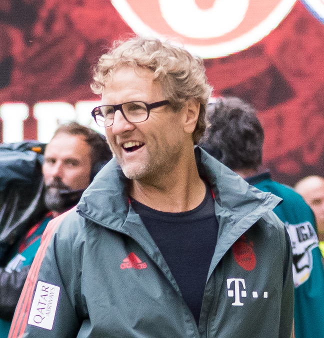 during 1.FC Kaiserslautern vs FC Bayern München at Fritz-Walter-Stadion, Kaiserslautern, Rheinland-Pfalz, Germany on 2019-05-27, Photo: Sven Mandel